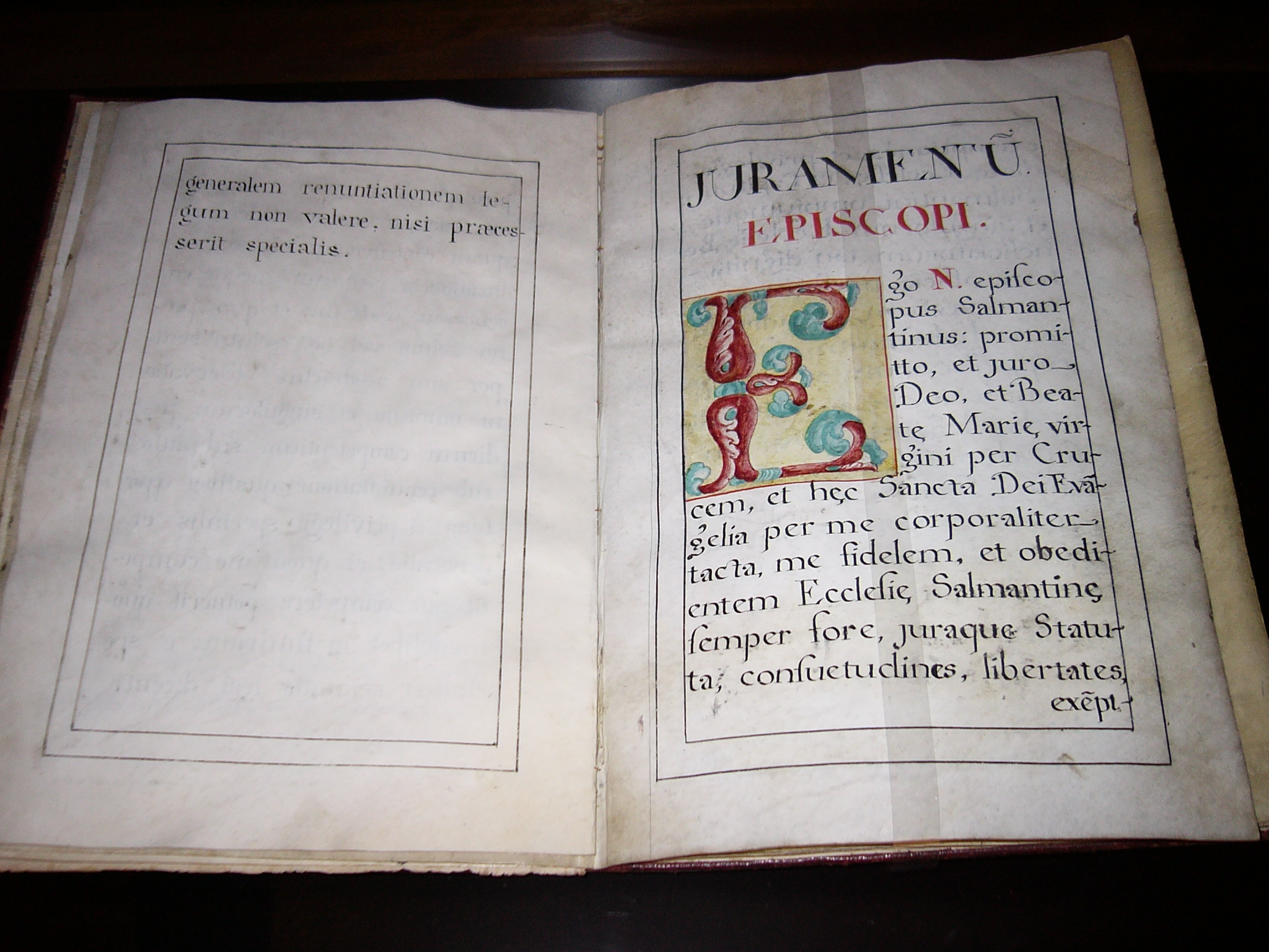 Description: Juramento obispal Subject: Fórmula de juramento obispal salmantino Book: religioso Photographer: © Manuel González Olaechea y Franco Shot date : November, 9th, 2004